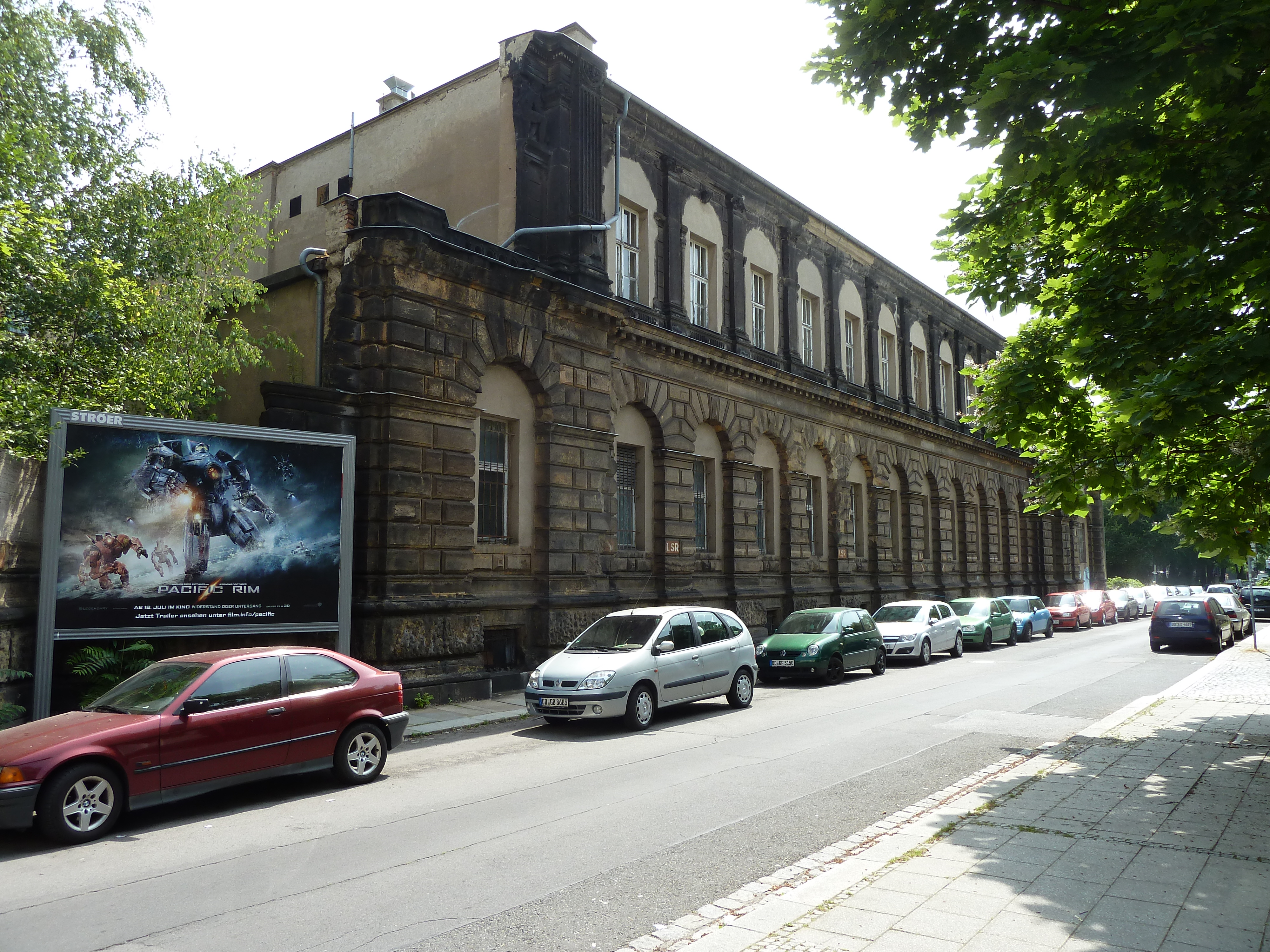 Der Flügel Am See der 1878 erbauten Oberpostdirektion Dresden wurde nach der Kriegszerstörung in einfacher Form wieder nutzbar gemacht.